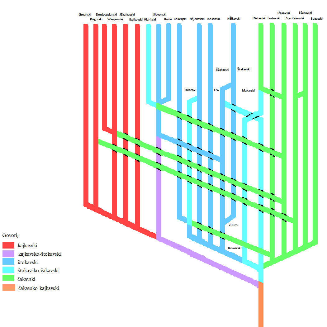 Pojednostavljeni prikaz razvitka hr. dijalekata